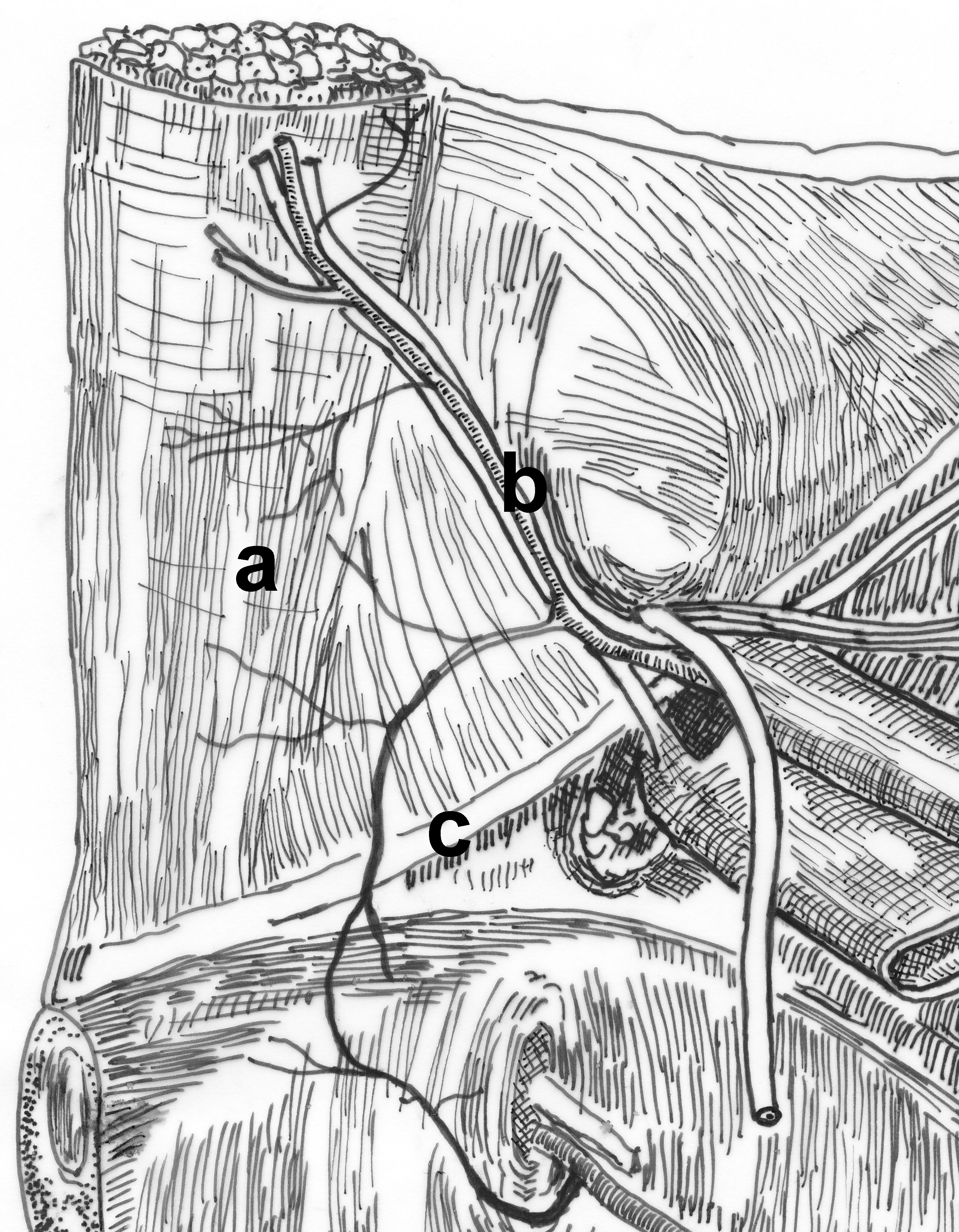 Schematyczny rysunek trójkąta Hesselbacha: a: mięsień prosty brzucha, b: naczynia nabrzuszne dolne, c: więzadło pachwinowe